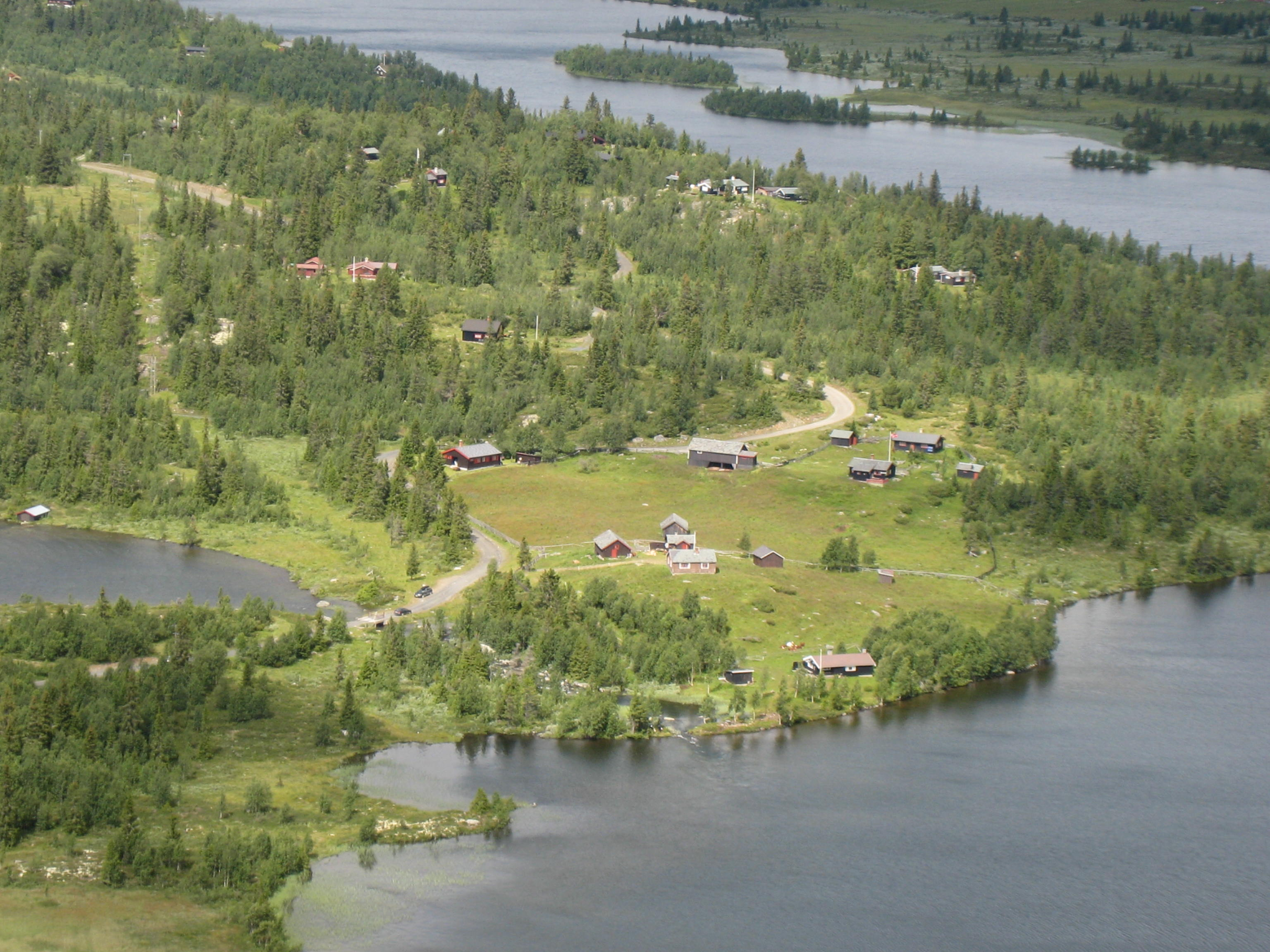 Buahaugen sett fra Rabalen, Øystre Slidre, Valdres, Norge, Norway